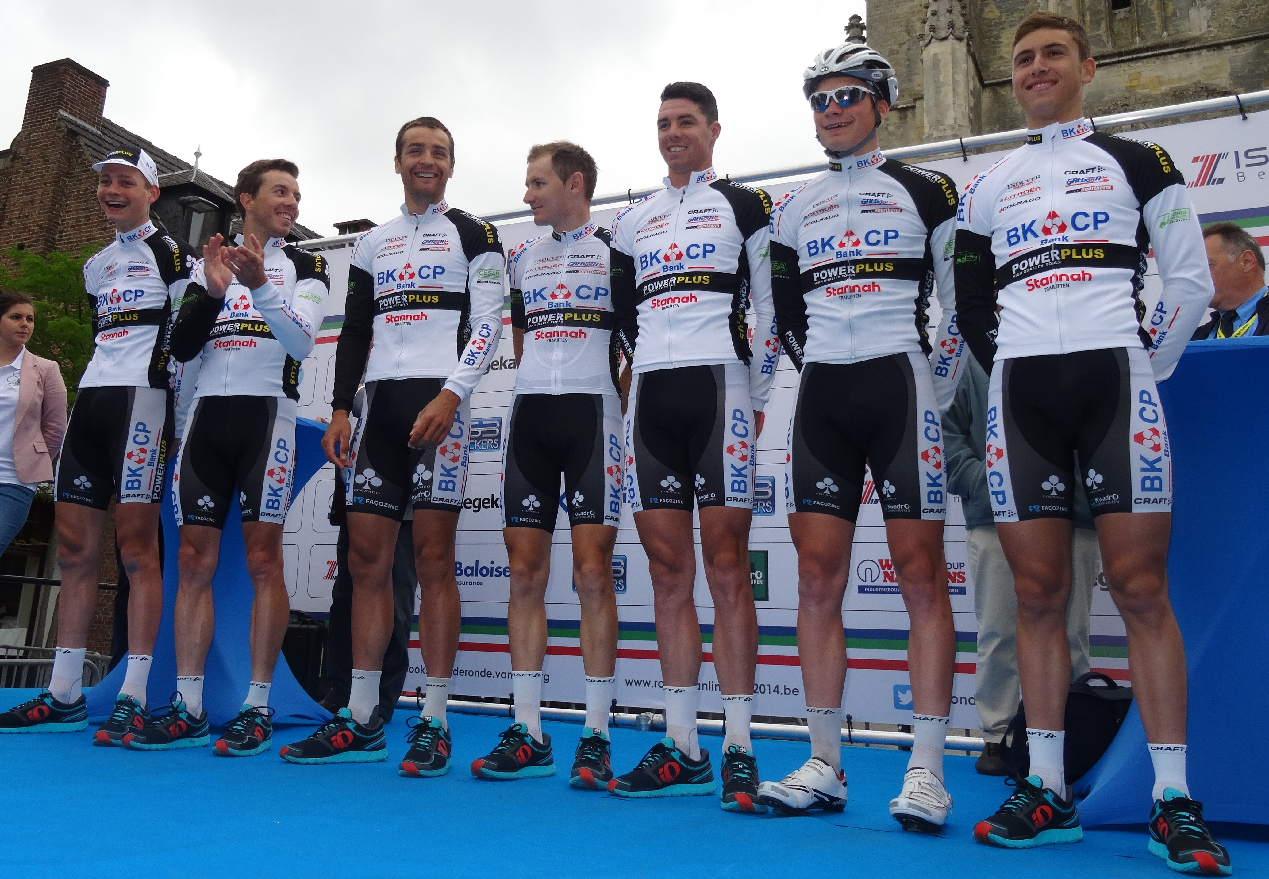 Reportage photographique réalisé le dimanche 15 juin à l'occasion du départ et de l'arrivée du Tour du Limbourg 2014 à Tongres, Belgique.